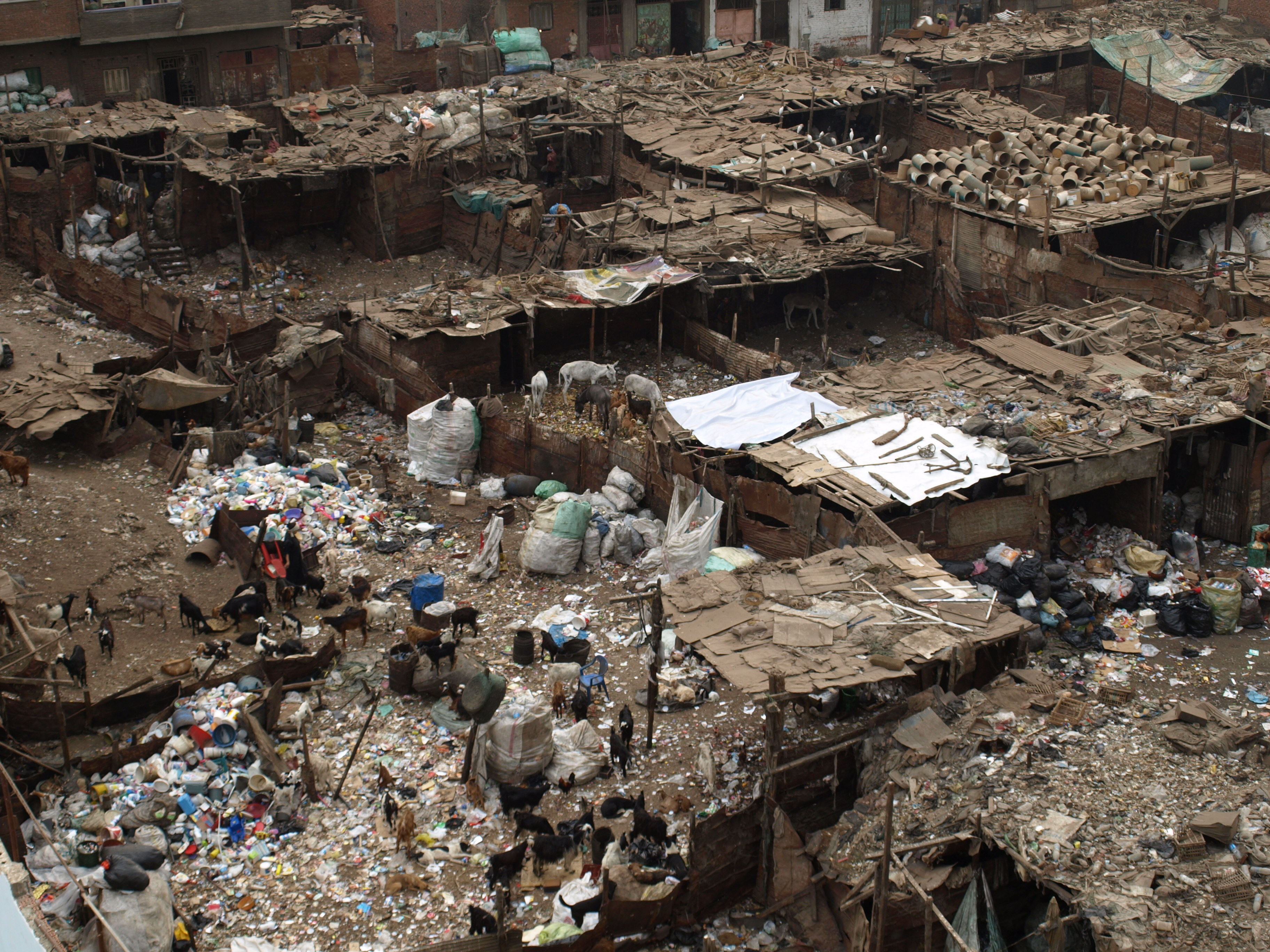 Müllgebiet in Ezbet Al Nakhl, einem armen Stadtteil nordöstlich der Innenstadt Kairos. Hier wird der Müll zentral zusammengetragen, sortiert und weiterverarbeitet.